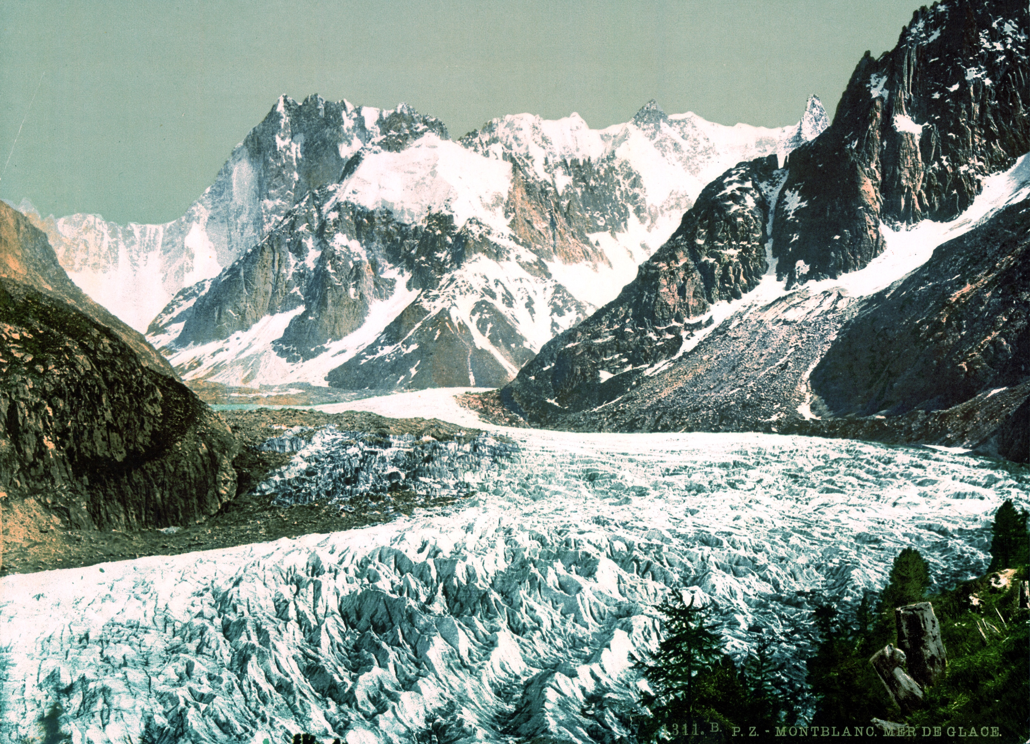 Mer de Glace, Dent du Géant et Grandes Jorasses, Chamonix, France.